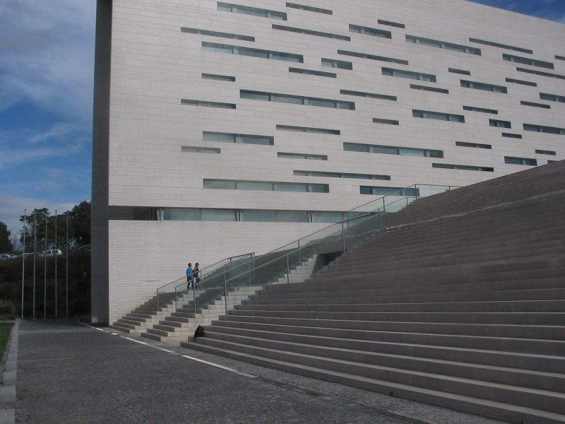 Neue Universität Lissabon